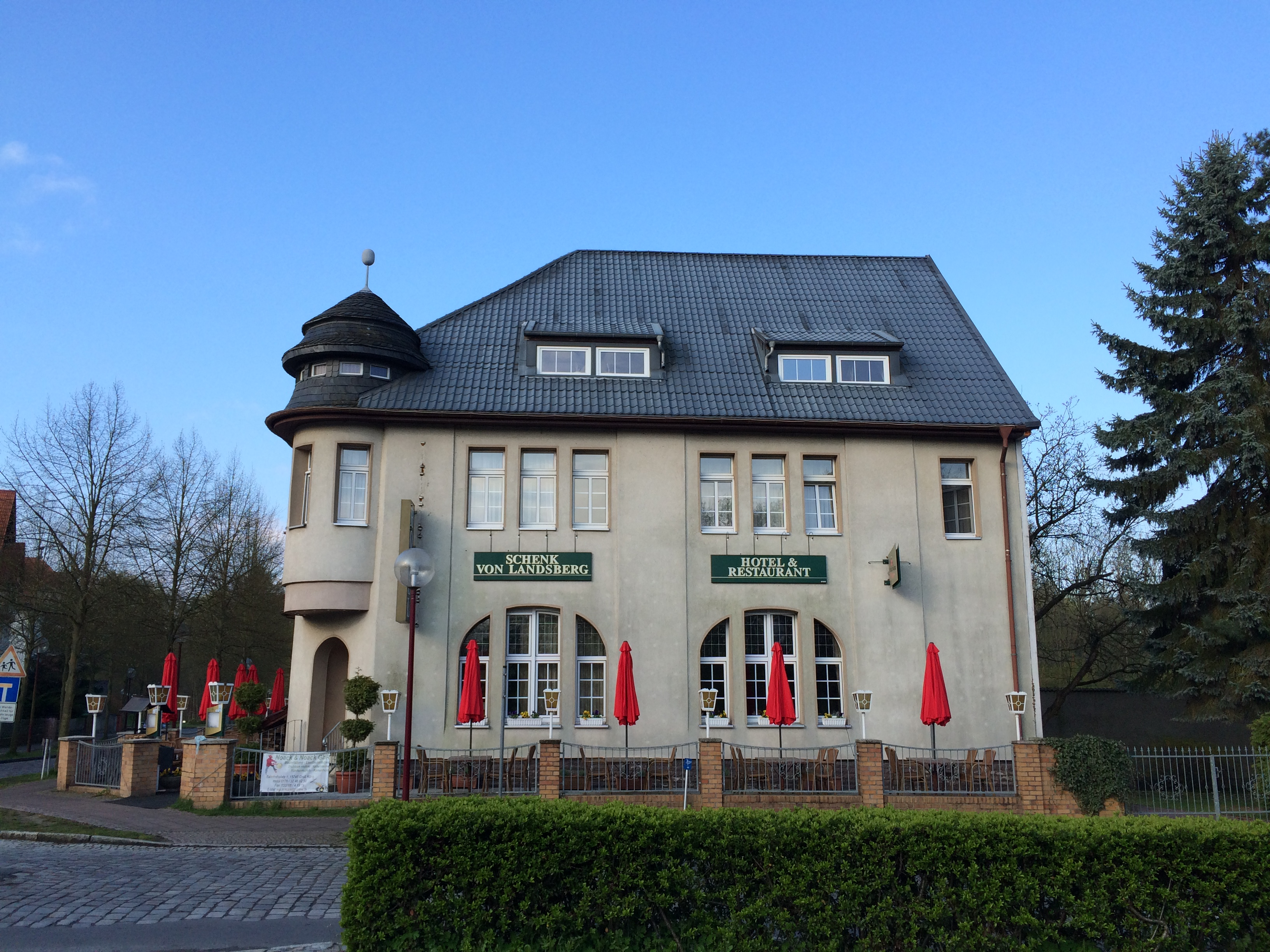 Denkmalgeschütztes Hotel "Schenk von Landsberg" in der Lindenstraße 5 in Teupitz